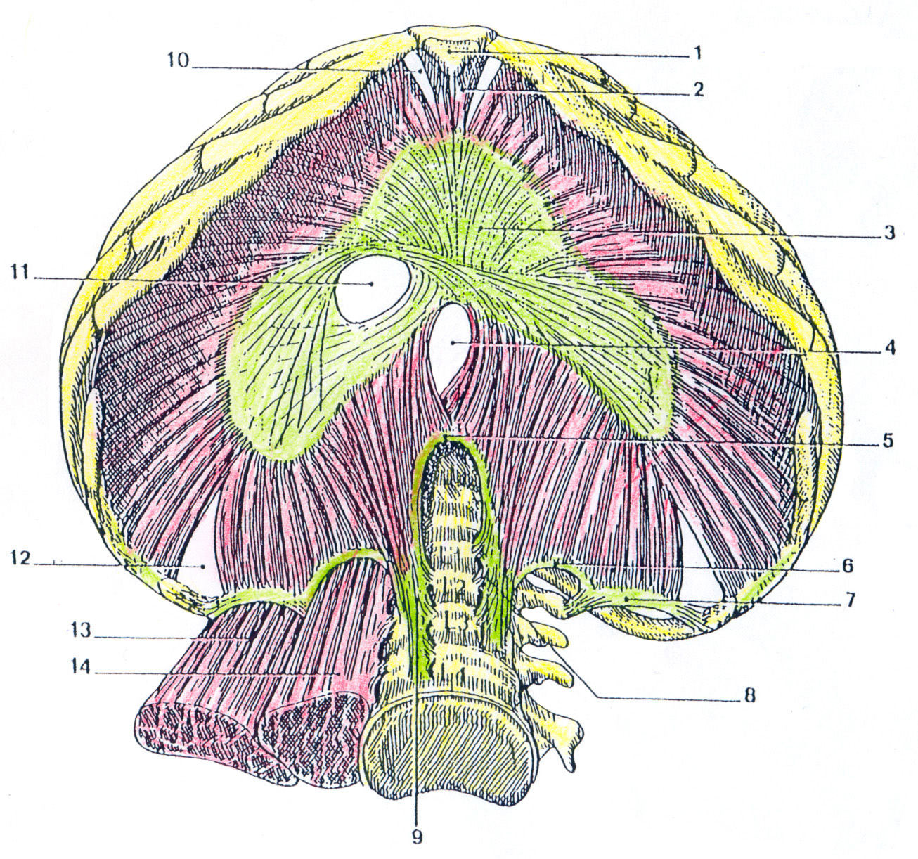 Vue inférieure du diaphragme. En jaune les os. En vert les ligaments et tendons. En rouge les tissus musculaires. Licensing Auteur : Raziel 25 mai 2006 à 17:08 (CEST) Date de création : 25/05/06